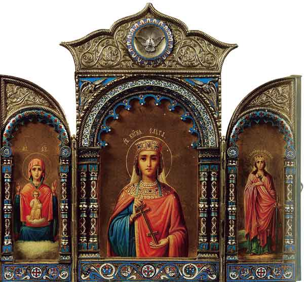 Императорская икона-складень «Св. Ольга». 1895. Серебро, золото, цветная эмаль, темпера. Коллекция В.Логвиненко